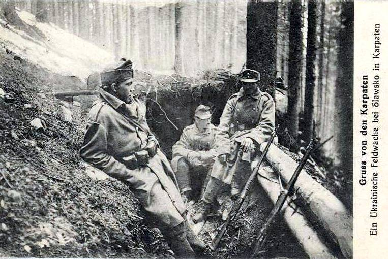 Ukrainische Feldwache mit dem Karabiner vor einem Bunker in Sławsko (Feldpost, Karpathen).